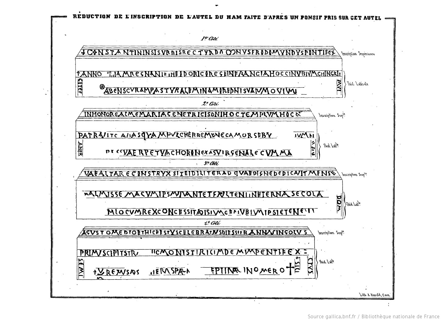 Inscription autel du Ham Léchaudé d'Anisy 1847